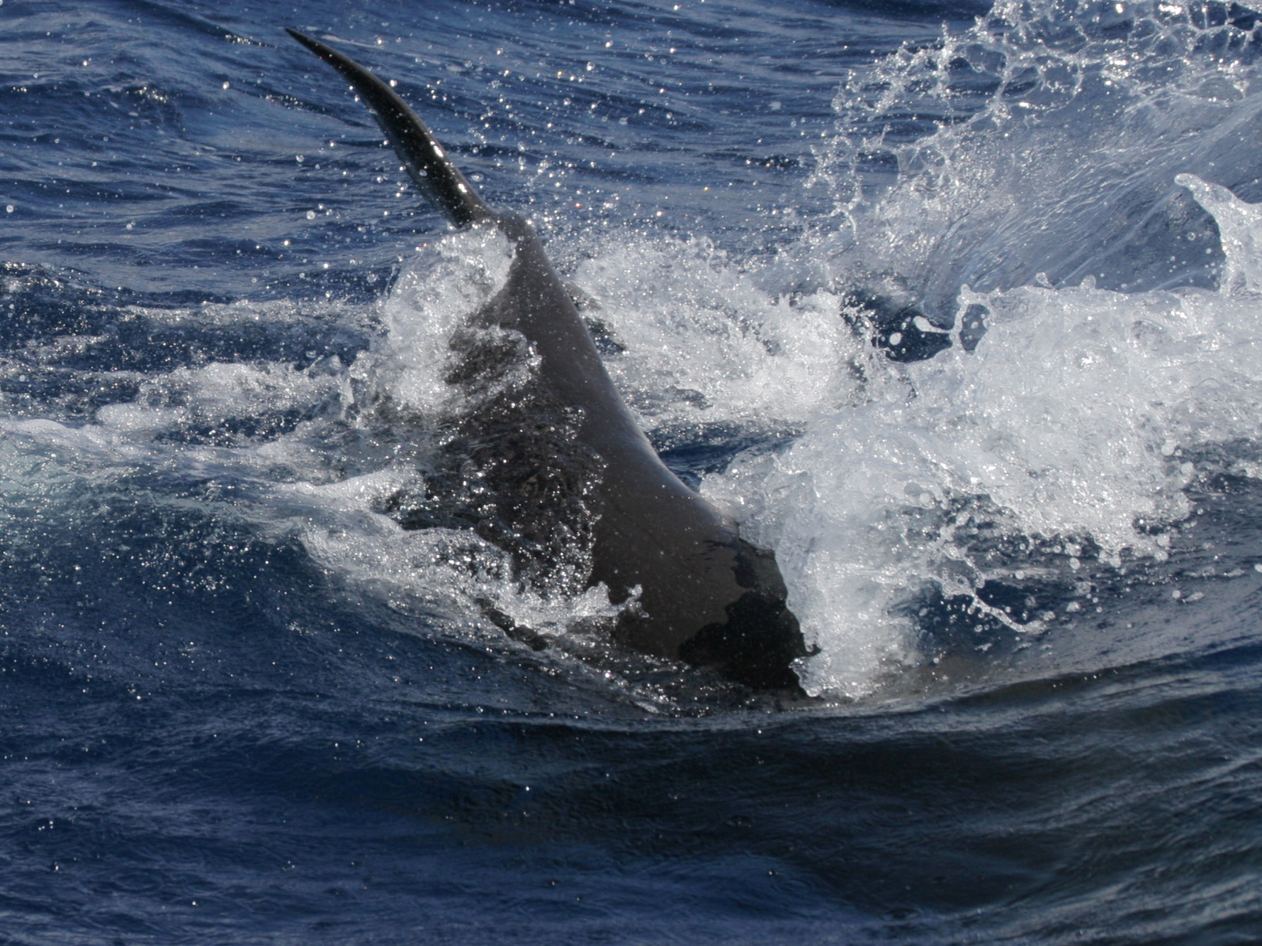 Indischer Grindwal (Globicephala macrorhynchus) vor La Gomera. Der Leitbulle schlägt mehrmals lautstark mit der Fluke aufs Wasser, um das unerwünschte Walbeobachtungsboot zu vertreiben